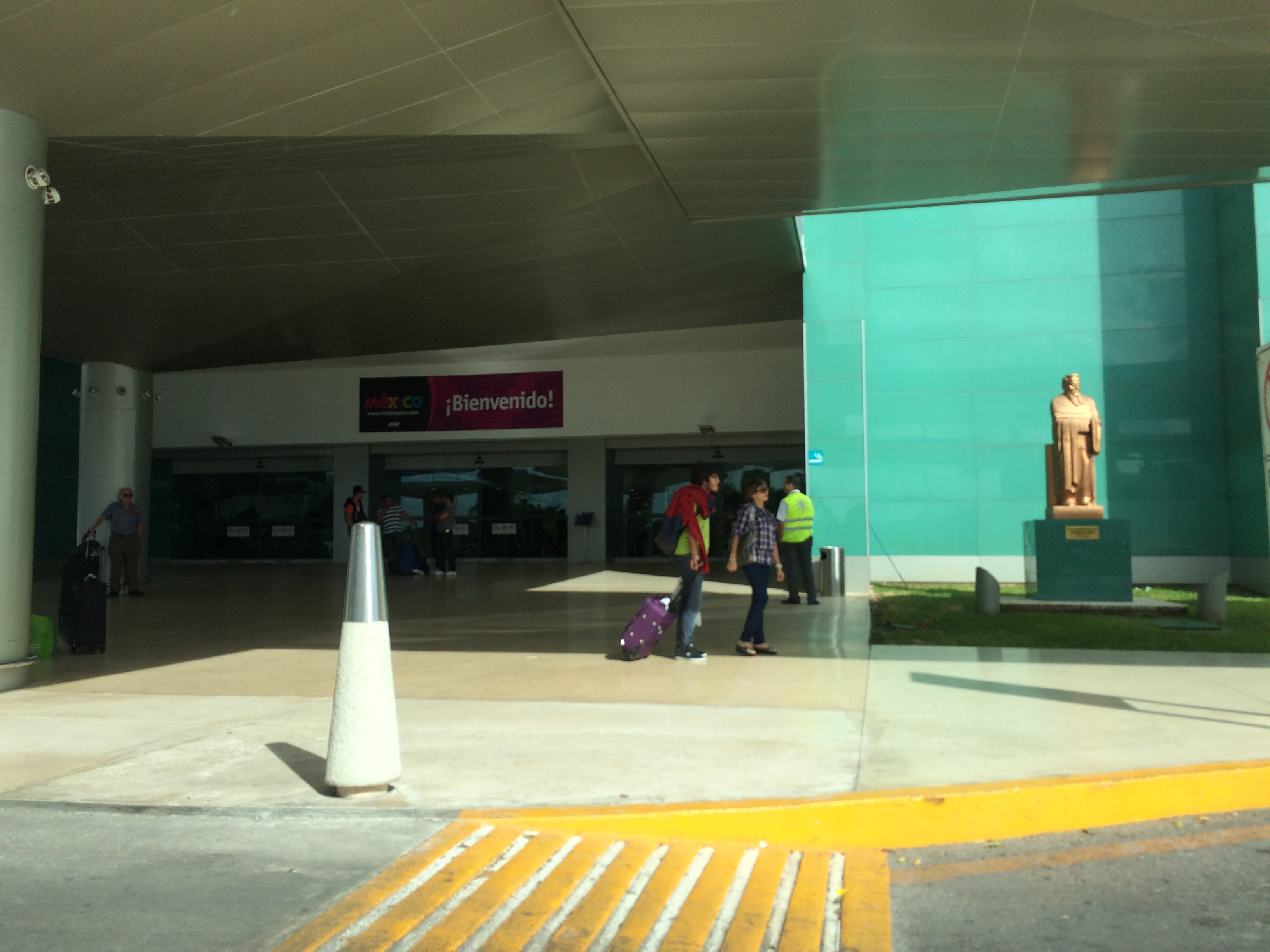 Exterior del Aeropuerto de Mérida.